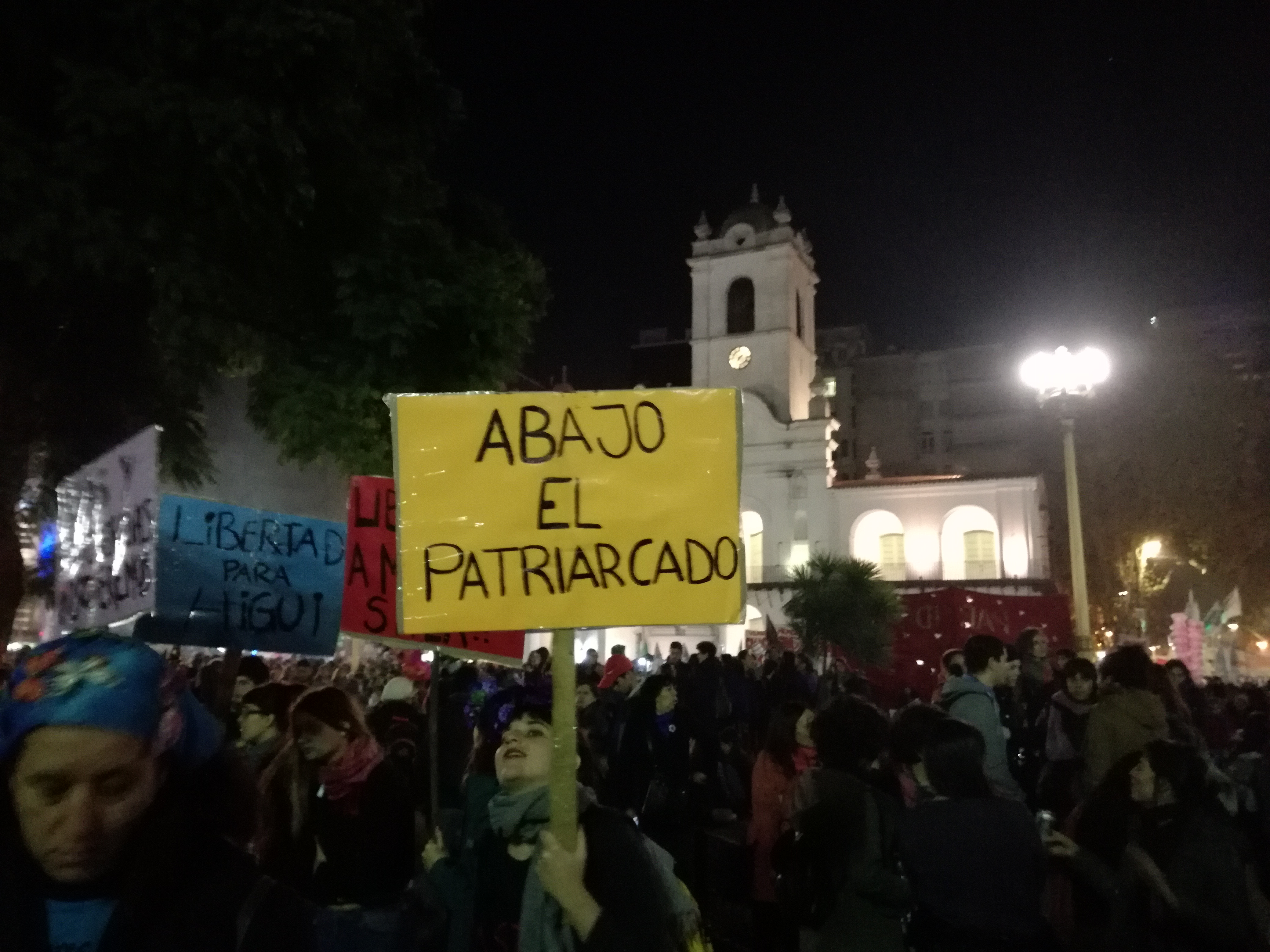 Marcha por Ni Una Menos. Buenos Aires.